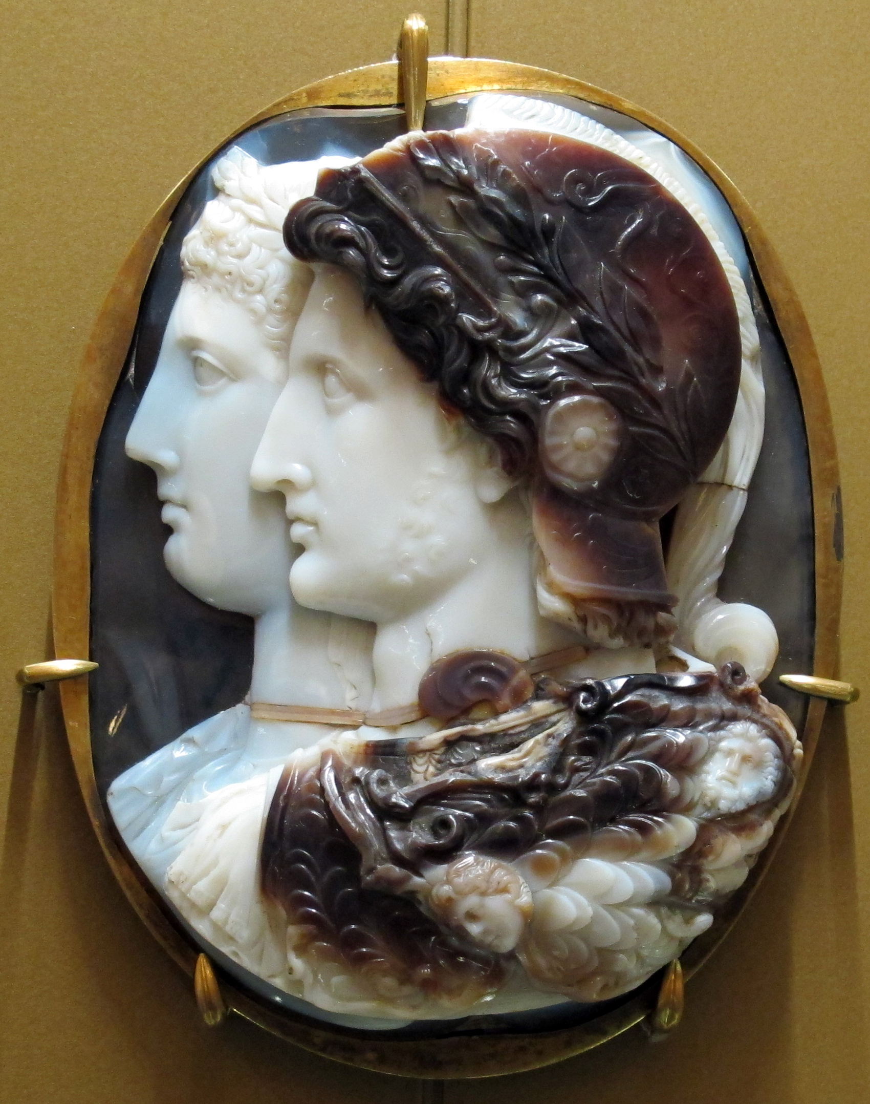 Sala delle Nozze Aldobrandini (Musei della biblioteca Apostolica Vaticana), esposizione temporanea (dicembre 2013) e collezione permanente